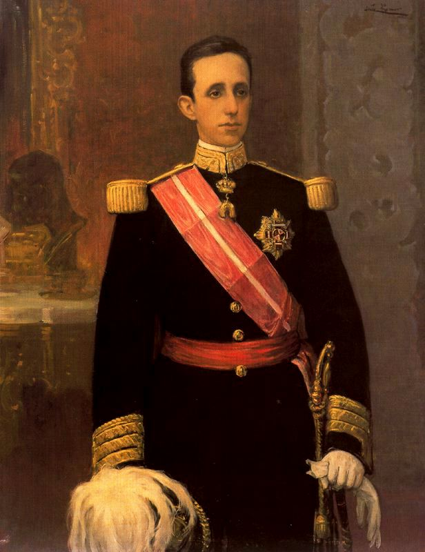 Retrato del rey Alfonso XIII de España (1886-1941), que fue hijo póstumo del rey Alfonso XII y de la reina María Cristina de Habsburgo-Lorena.